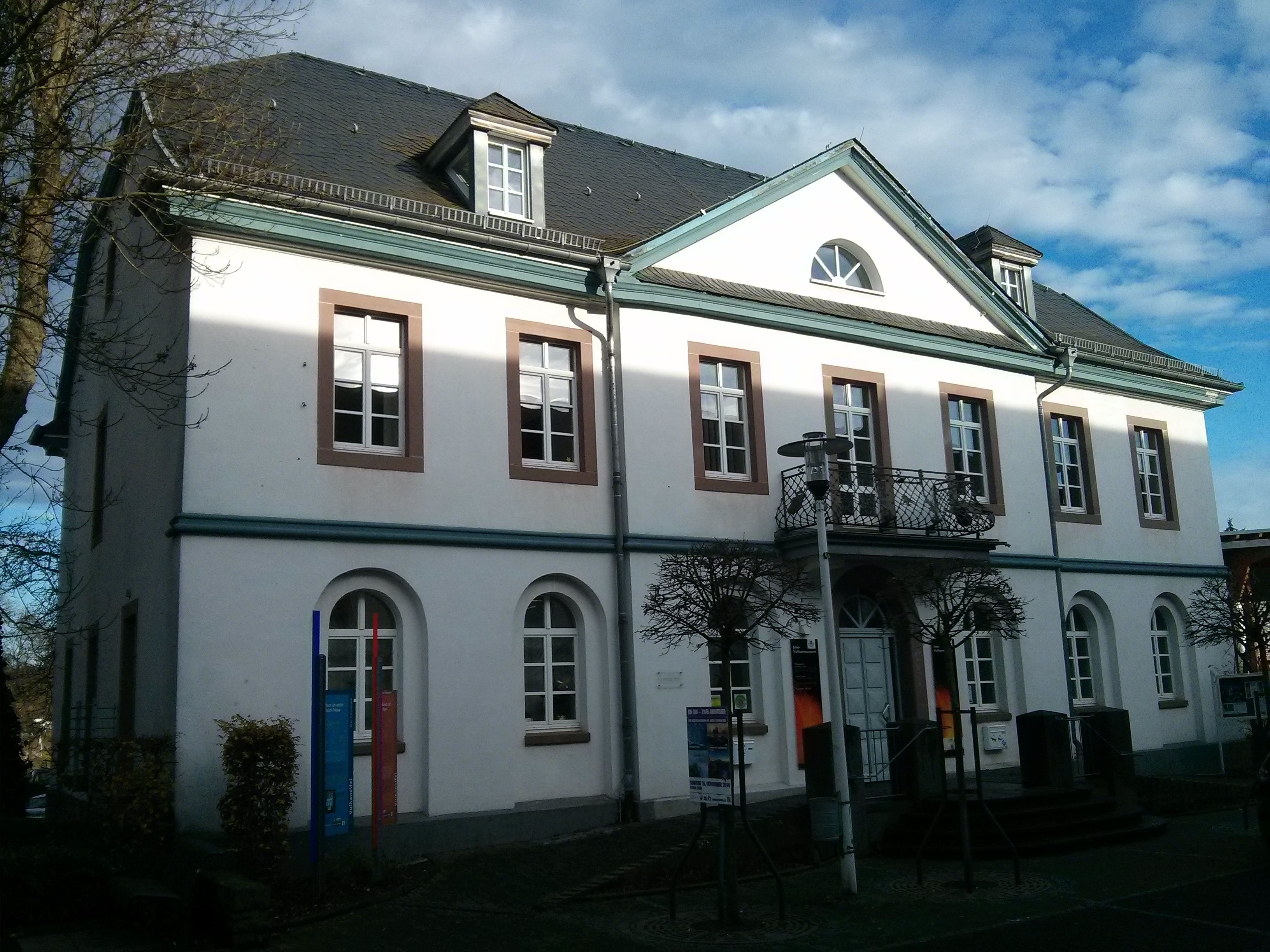 Eifel-Vulkanmuseum, Leopoldstraße 9, 54550 Daun